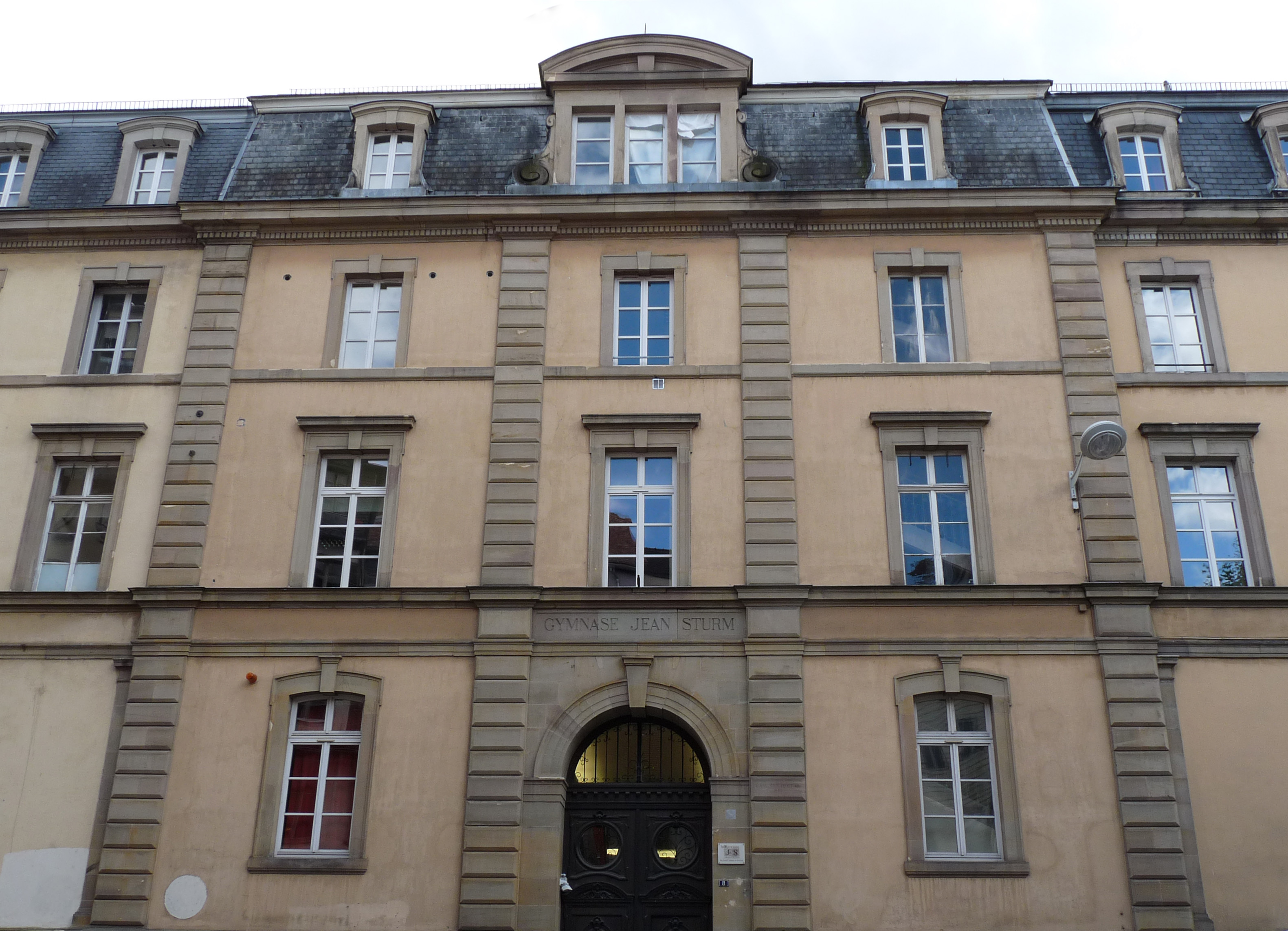 Gymnase Jean-Sturm à Strasbourg